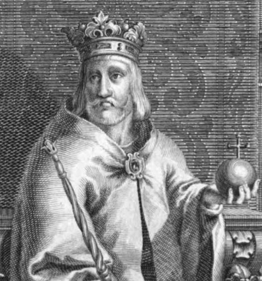 Szapolyai/Zápolya János (Szepesvár, 1487. február 2. – Szászsebes, 1540. július 17./21.) erdélyi vajda, 1526-tól haláláig I. János néven Magyarország választott királya.